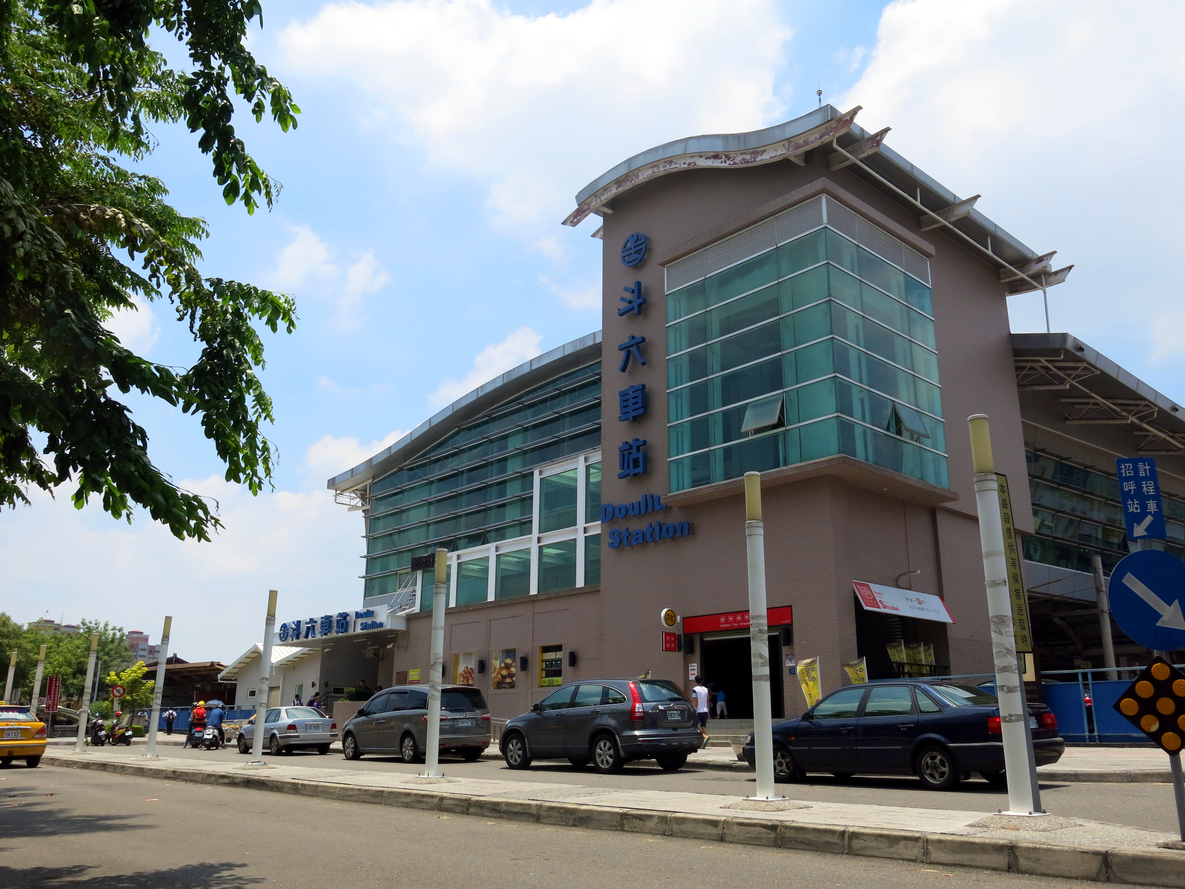 中文（台灣）: 台灣鐵路管理局斗六車站前出口